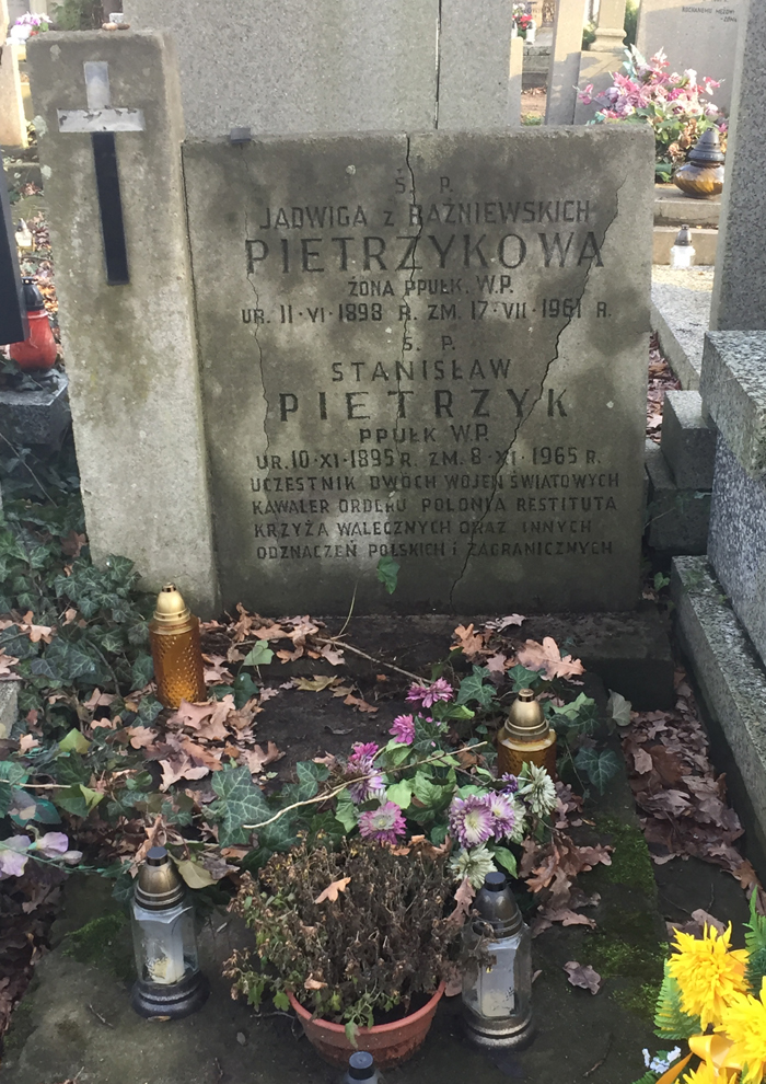 Grób ppłk. Pietrzyka na warszawskim Cmentarzu Bródnowskim